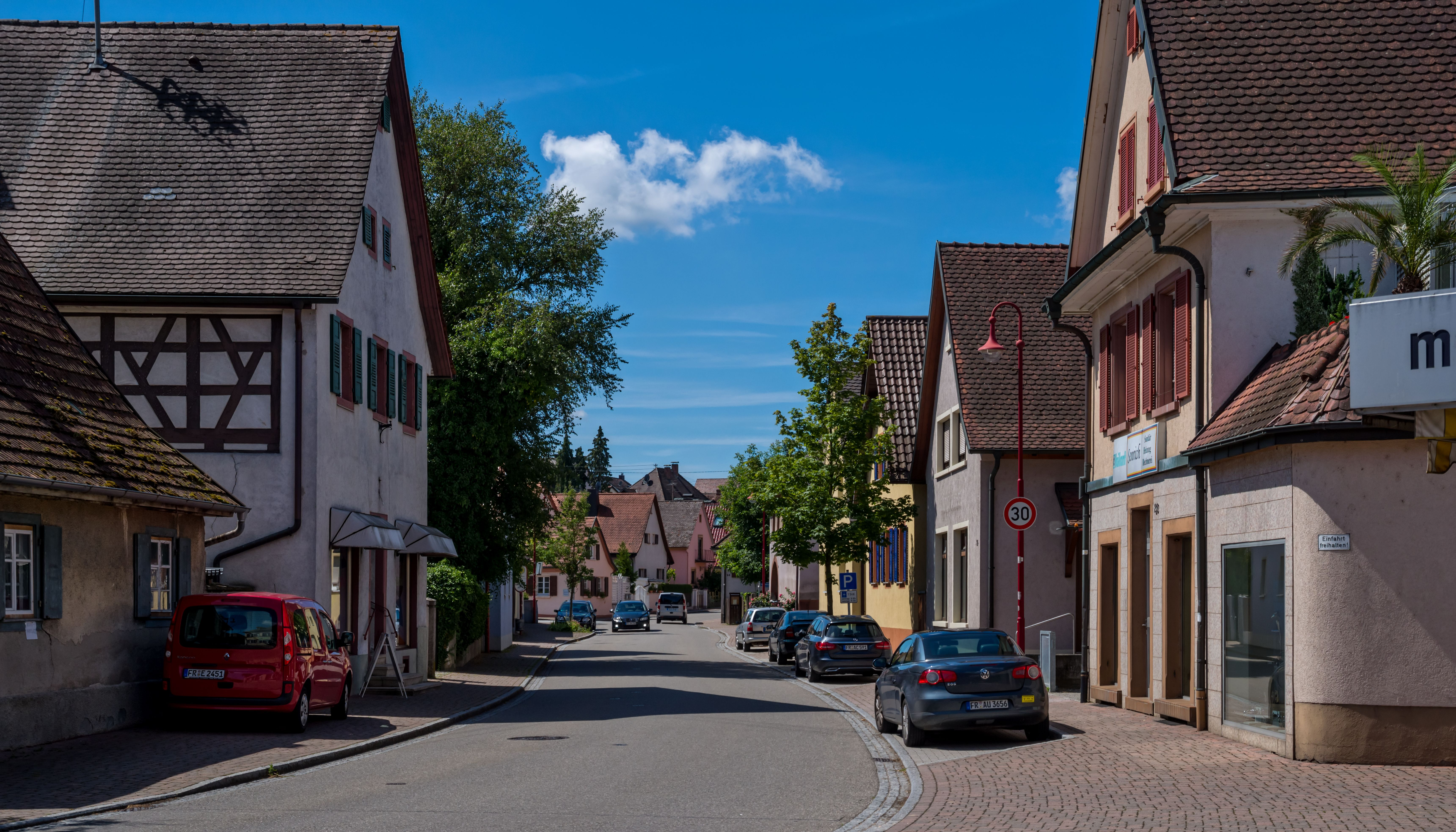 Bilder aus Gottenheim